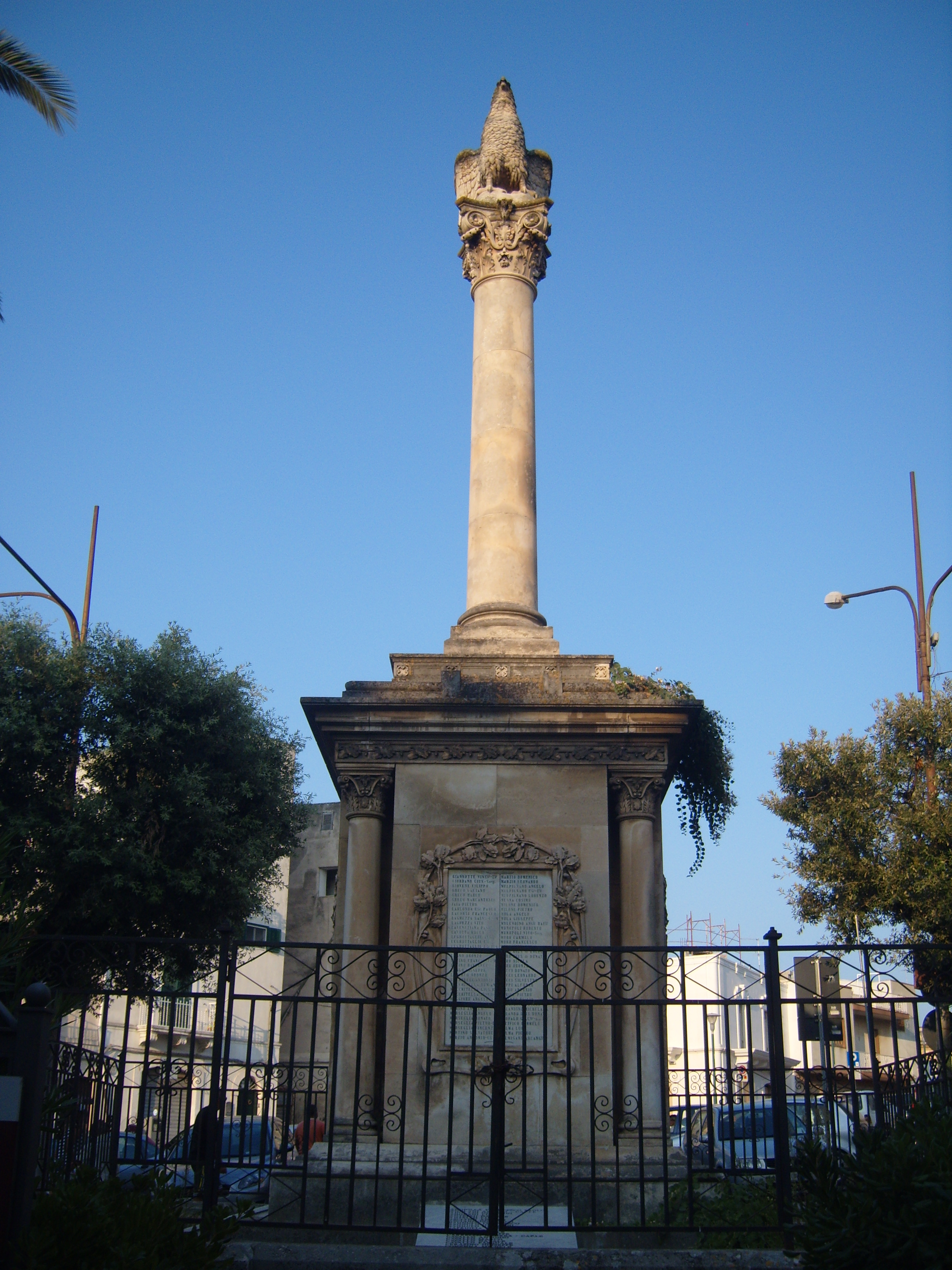 Ostuni (BR) - Monumento ai caduti (1923)